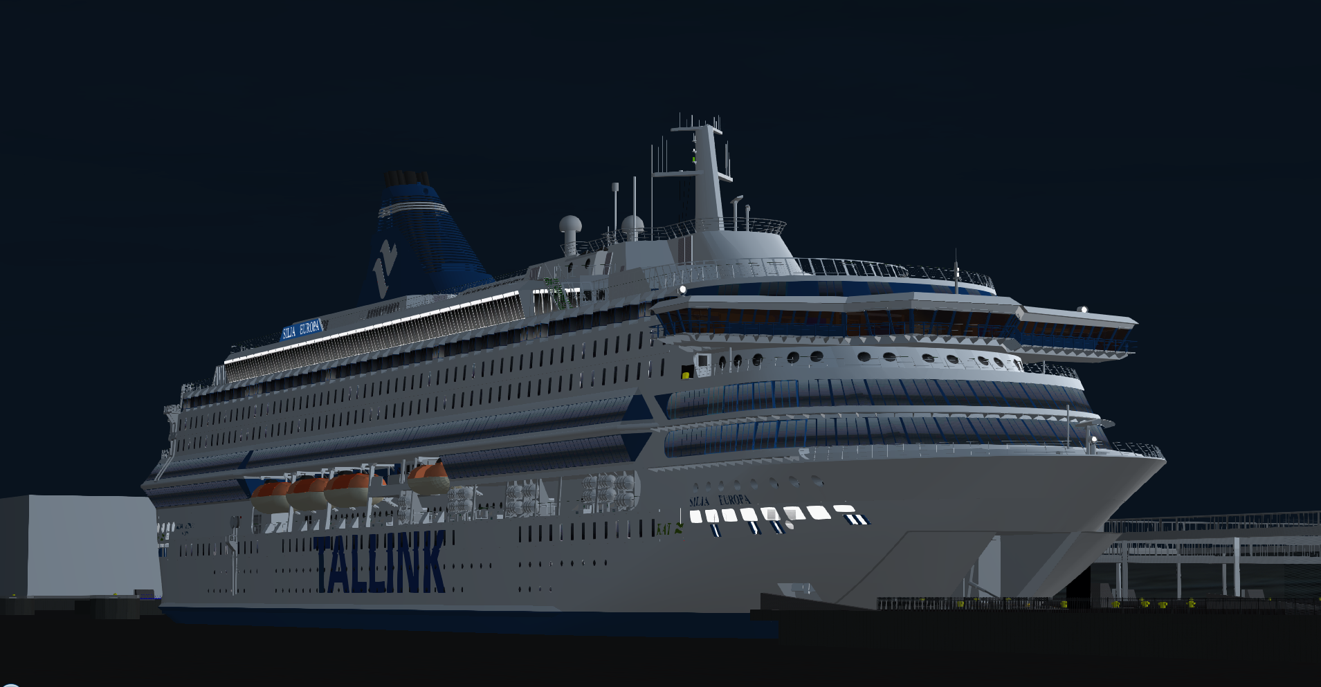 Silja Europa Future Portissa